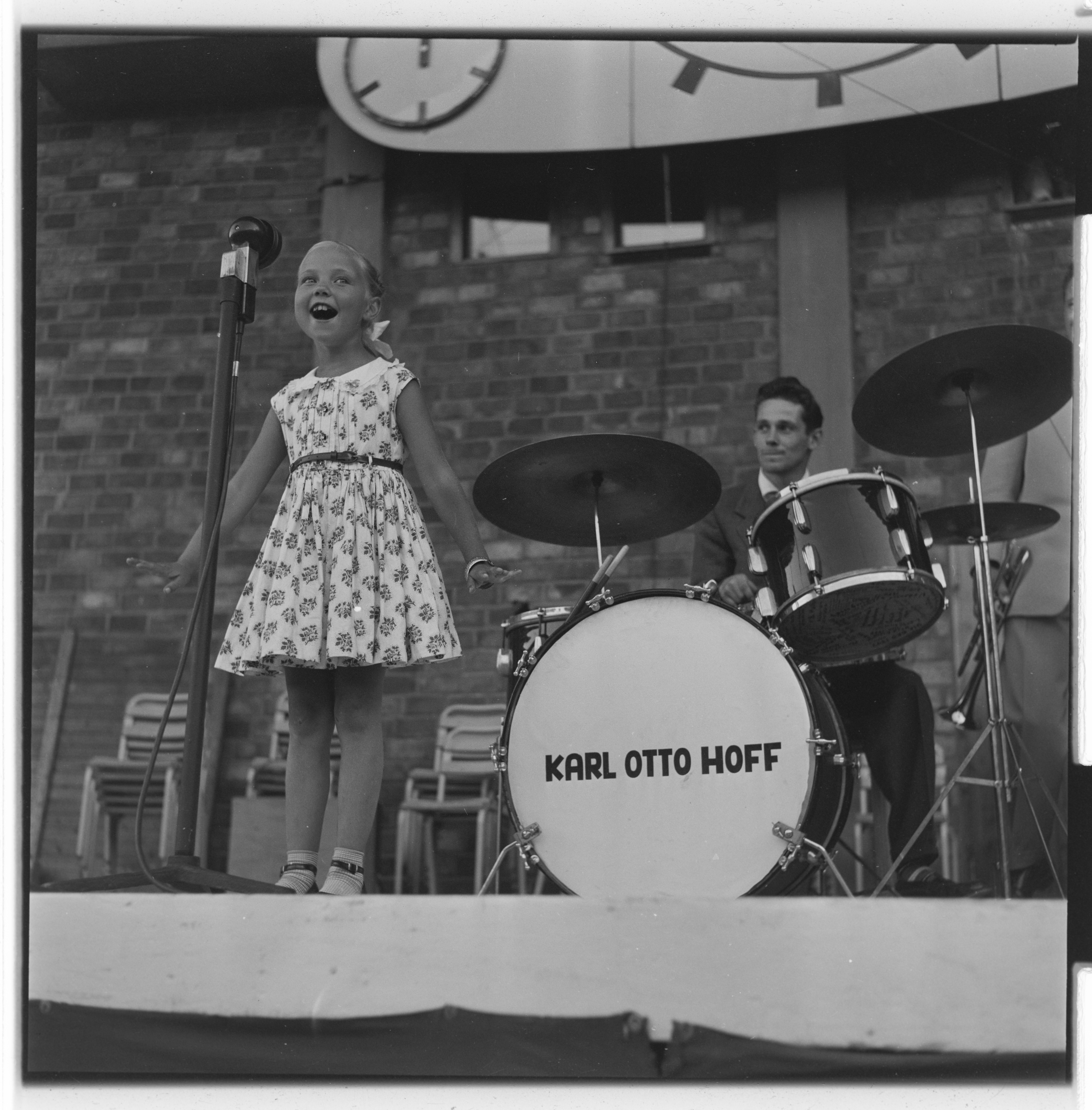 Bildet er hentet fra Arkivverket. Delta Rythm Boys på Jordal Amfi Arkivinstitusjon : Riksarkivet Arkivnavn : Billedbladet NÅ Sted : Norge, Oslo, Oslo, Jordal Amfi Emneord: konsert, musikere Avbildet: Kausland, Grete